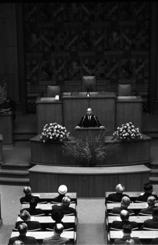 CDU-Bundesparteitag in Düsseldorf